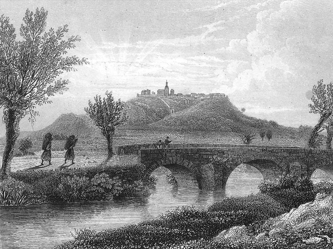 Amöneburg, 1850, Stahlstich auf Papier · schwarz-weiß